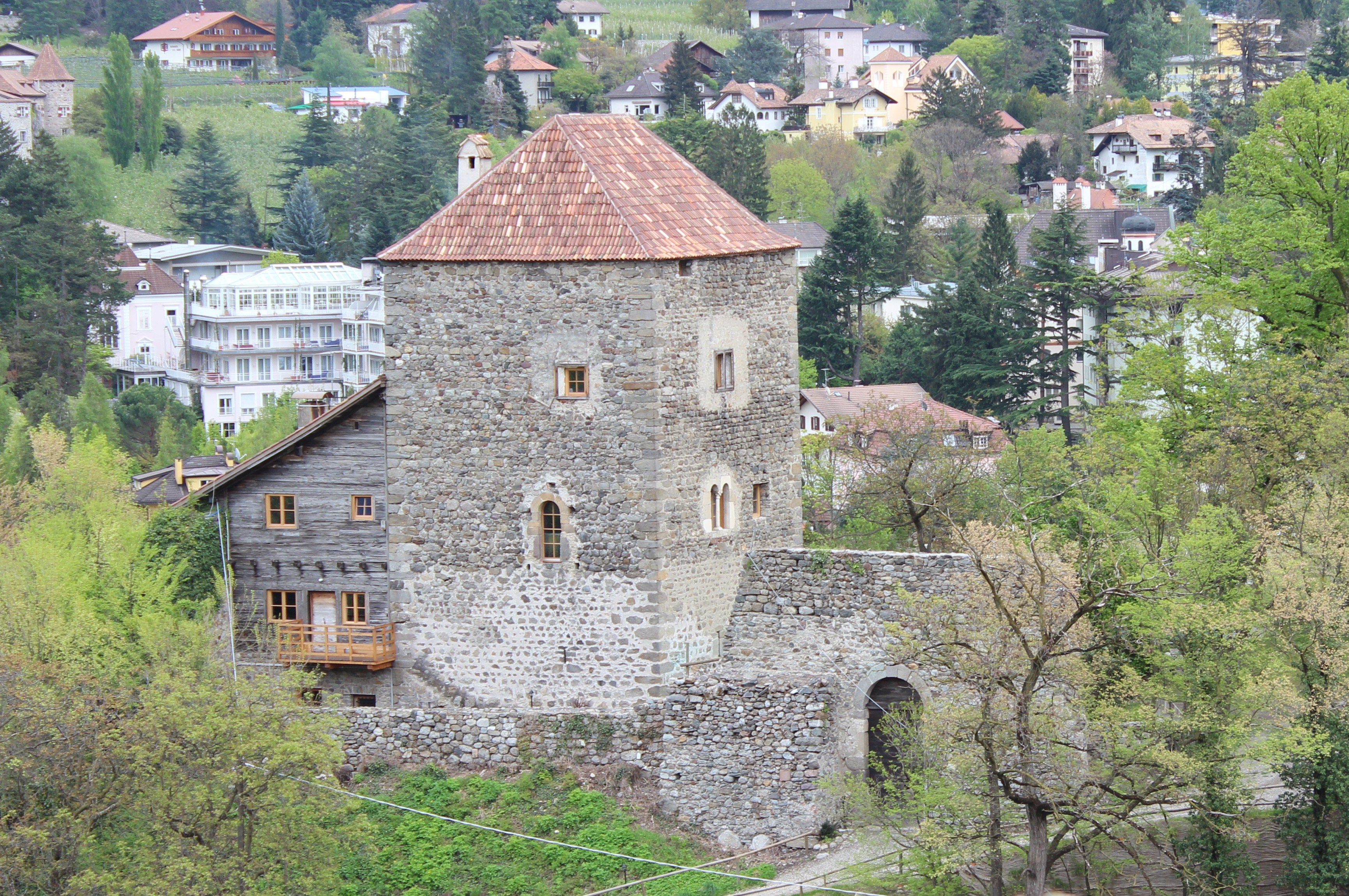 Zenoburg in Dorf Tirol